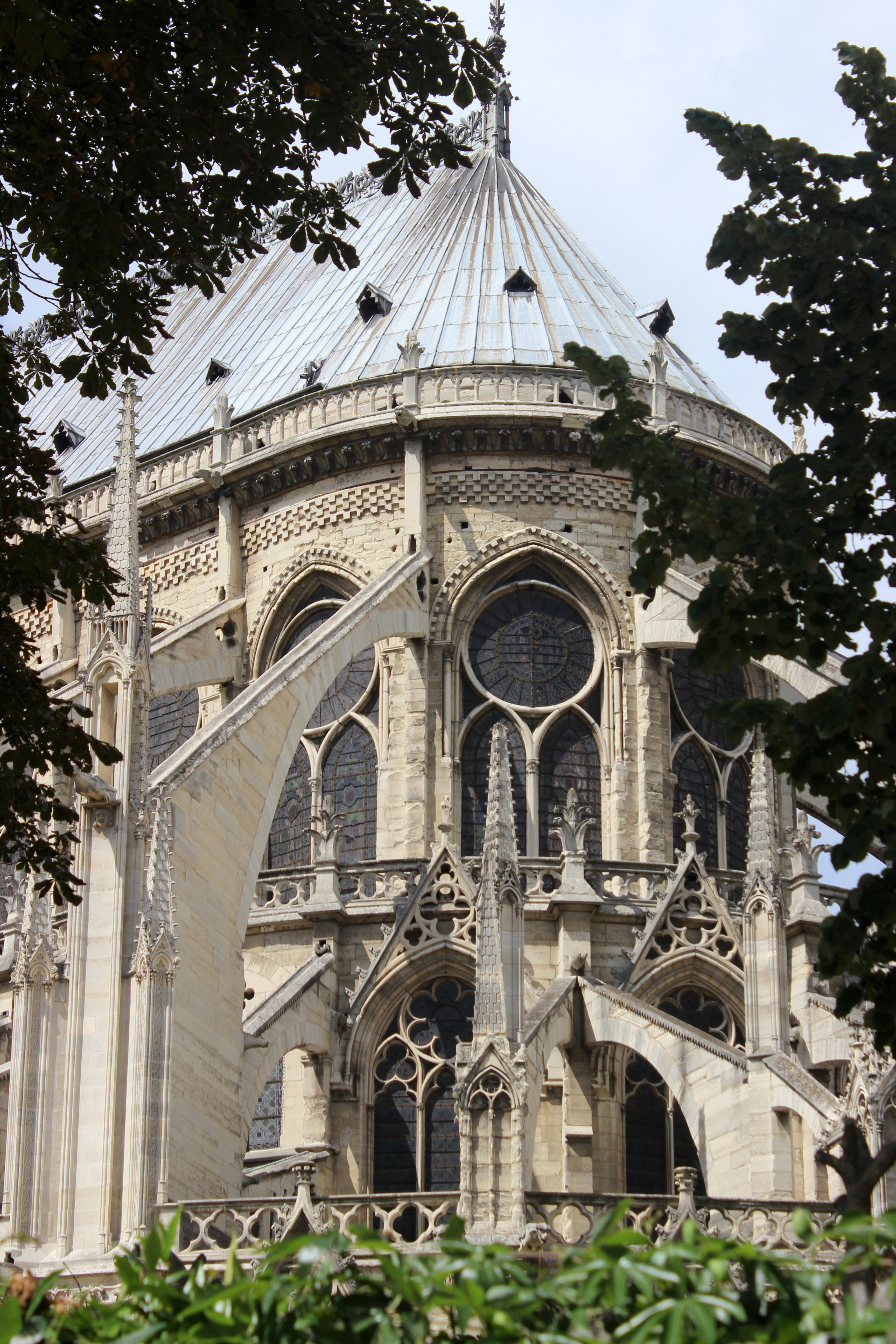 París. Notre-Dame. Vista desde el SE. Ábside.